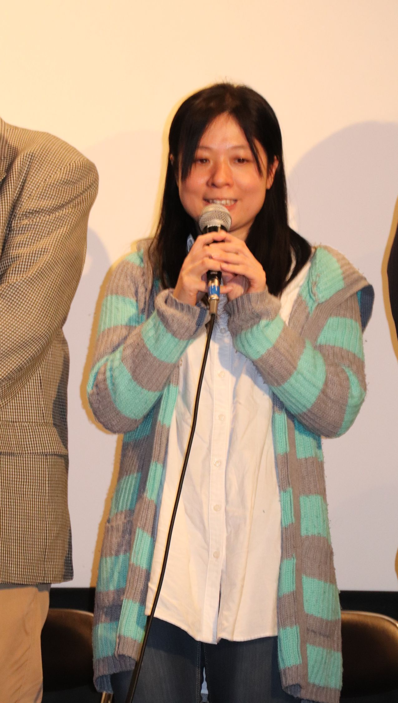 上野オークラ劇場・2020年1月4日、舞台挨拶